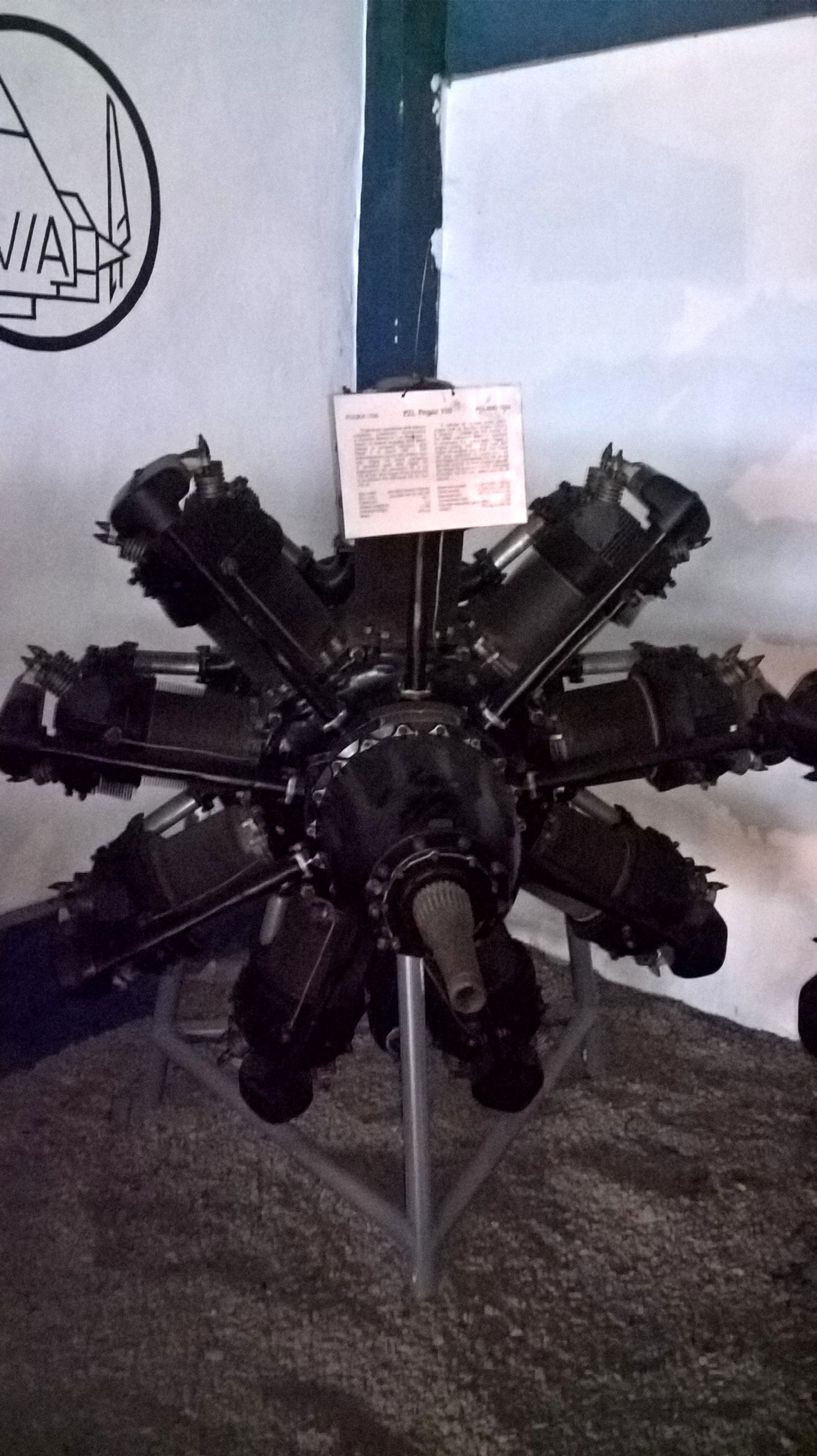 Licencyjny 9-cylindrowy silnik gwiazdowy Bristol Pegasus VIII z 1936 r., produkowany pod nazwą PZL Bristol Pegaz VIII (używany do napędu samolotów rozpoznawczo-bombowych PZL P.23B Karaś), ze zbiorów Muzeum Lotnictwa Polskiego w Krakowie.